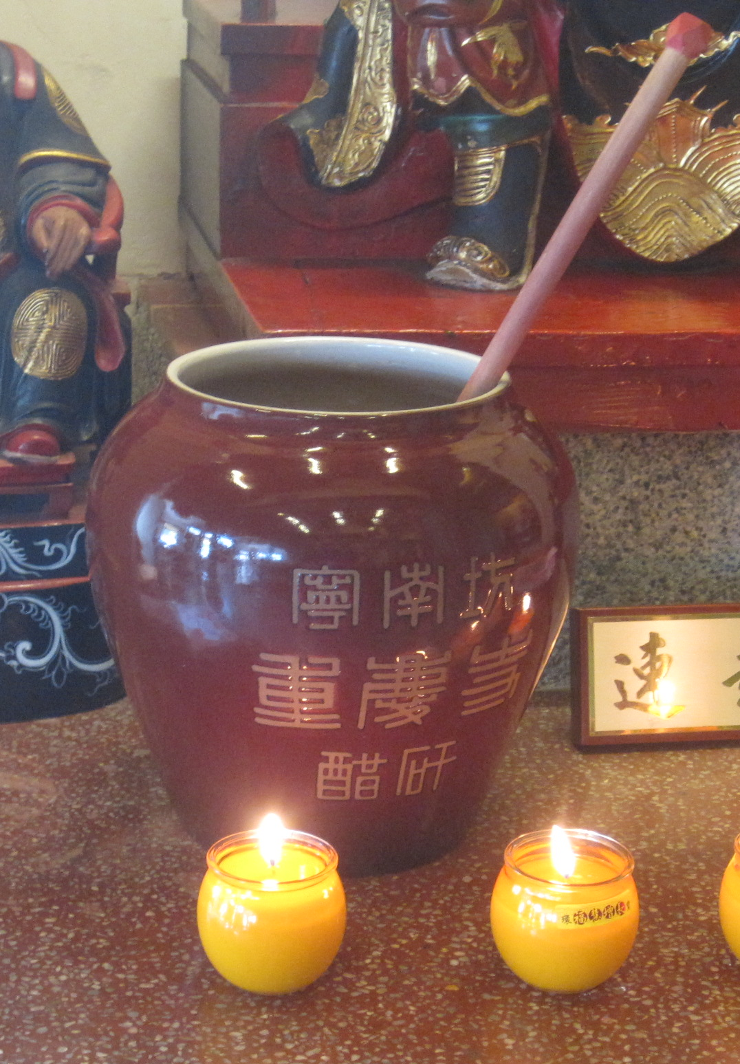 臺南重慶寺的醋矸